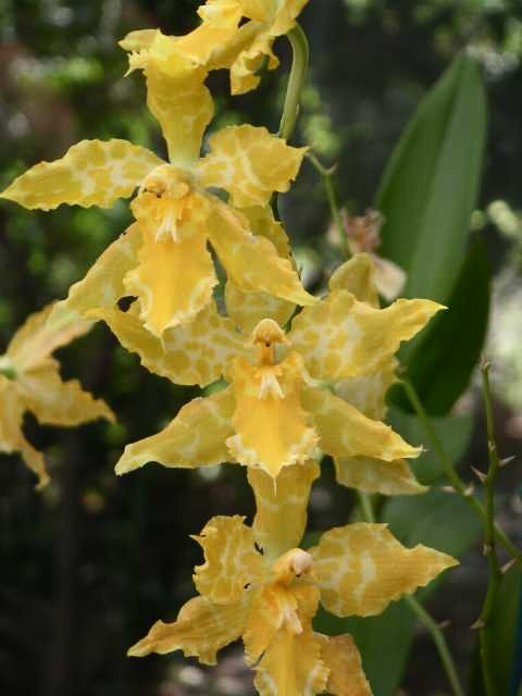 Description: Cambria sp., août 2004, collection personnelle Source: Jean-Jacques MILAN Licence: GFDL Jean-Jacques MILAN